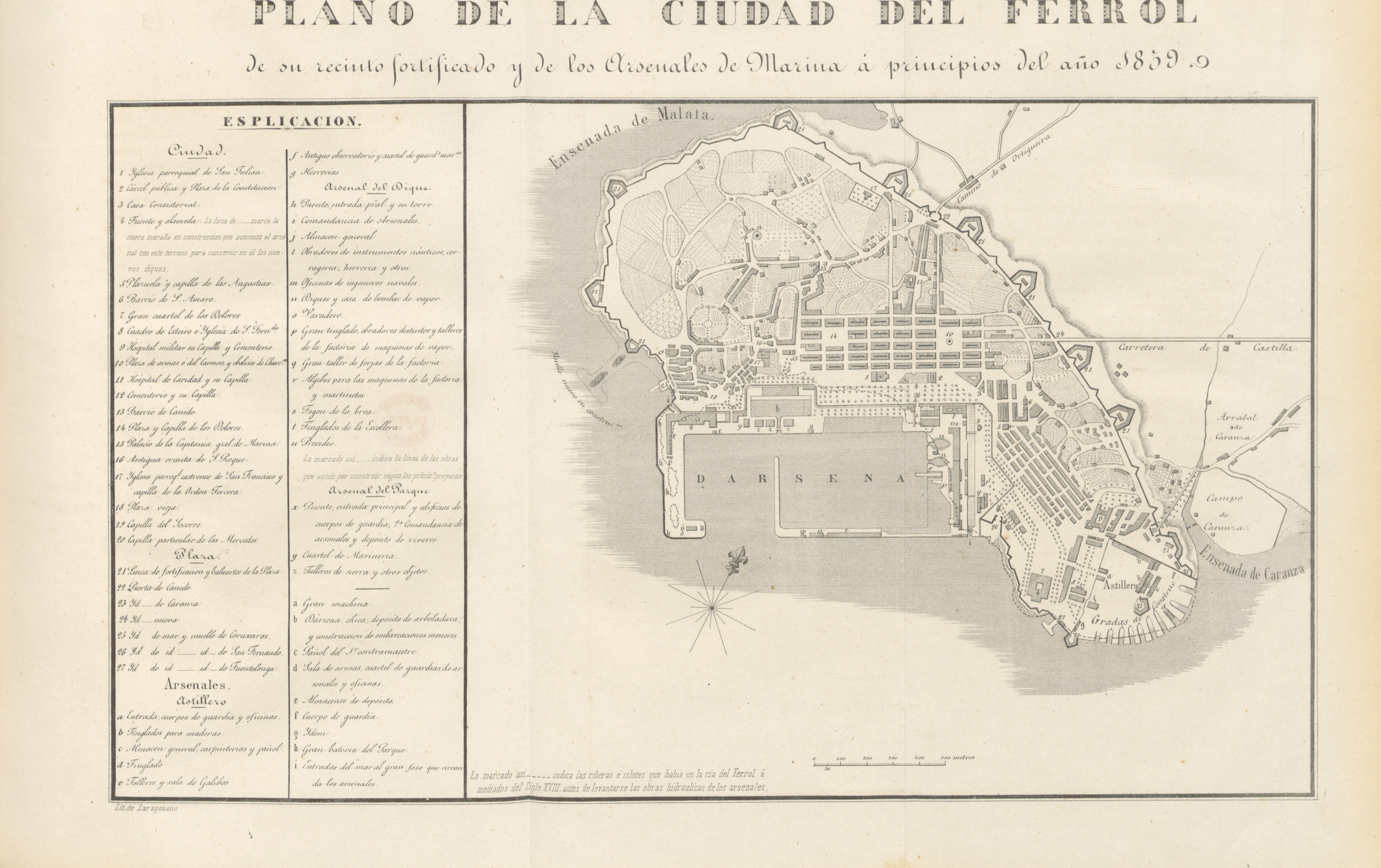 "Viaje de SS. MM. y AA. por Castilla, Leon, Asturias y Galicia, verificado en el verano de 1858"